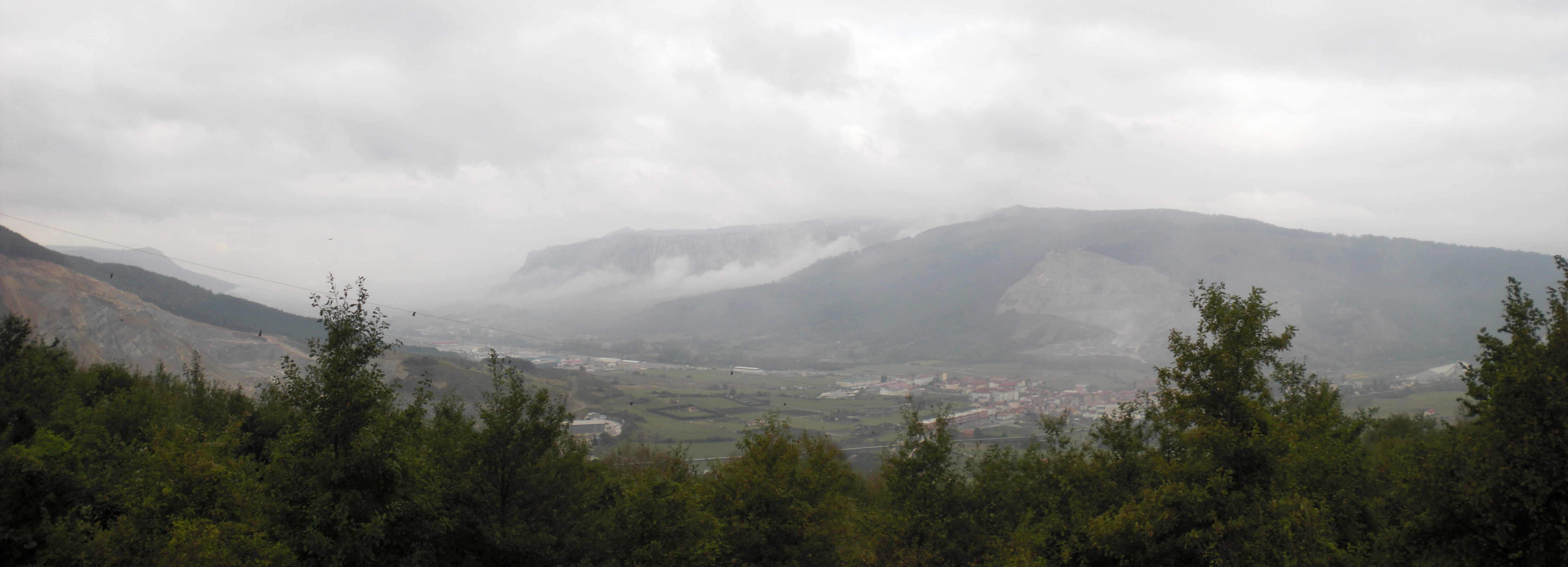 Olatzagutia Urbasako mendatetik ikusita.